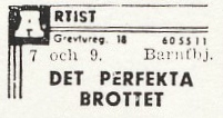 Biografannons för biografen "Artist" i Stockholm lördagen den 20 november 1948 i Expressen